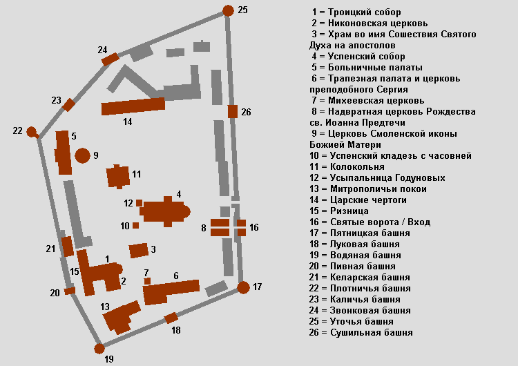 Приблизительный план территории Троице-Сергиевой лавры